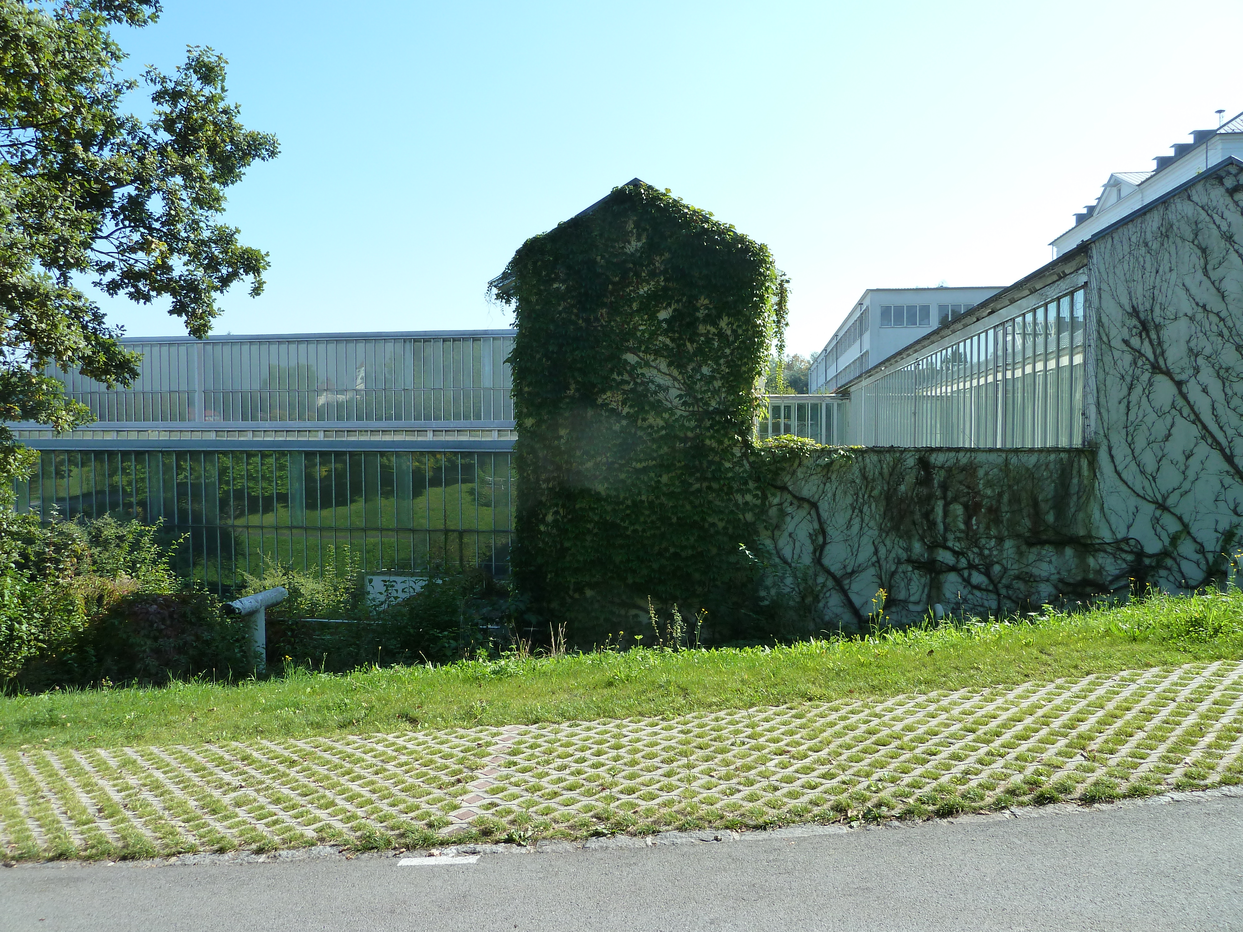 Pädagogische Akademie der Diözese Linz